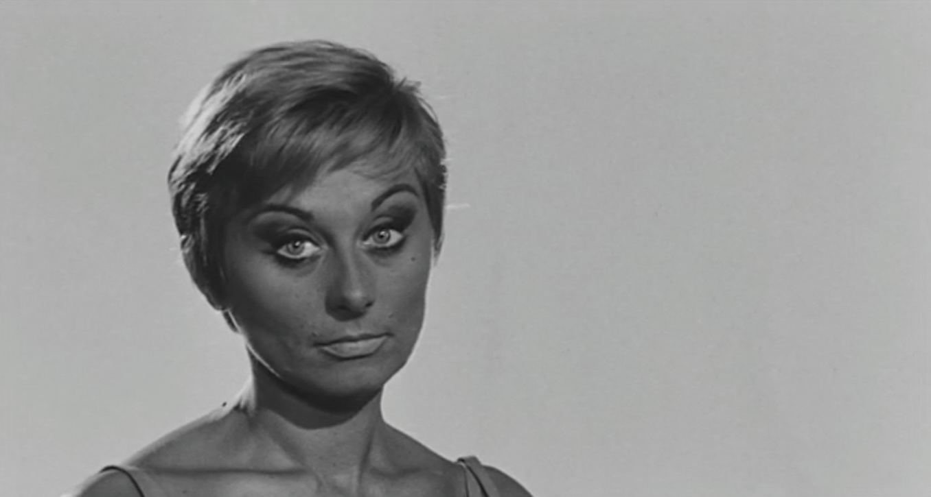 Screenshot dal film Cadavere per signora (1964)